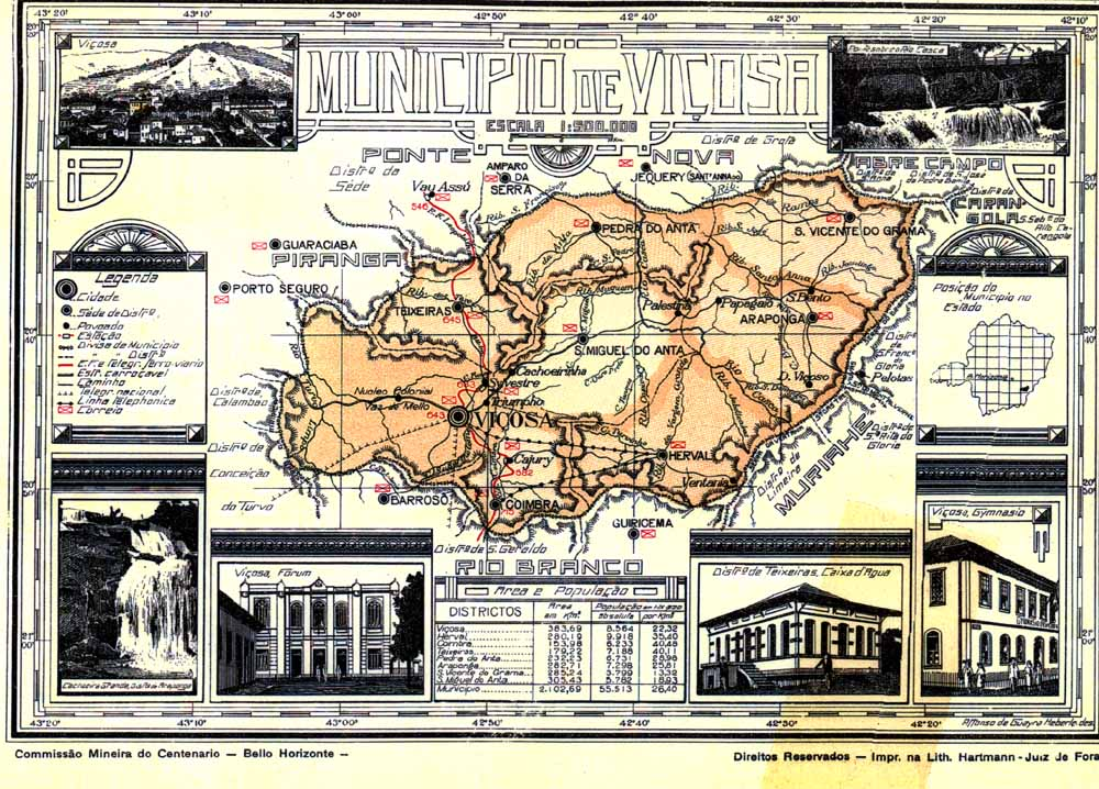 Mapa ilustrativo de Viçosa, na Década de 1910